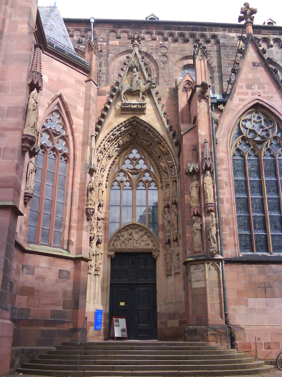 Главный вход в собор св. Петра, Вормс, Германия